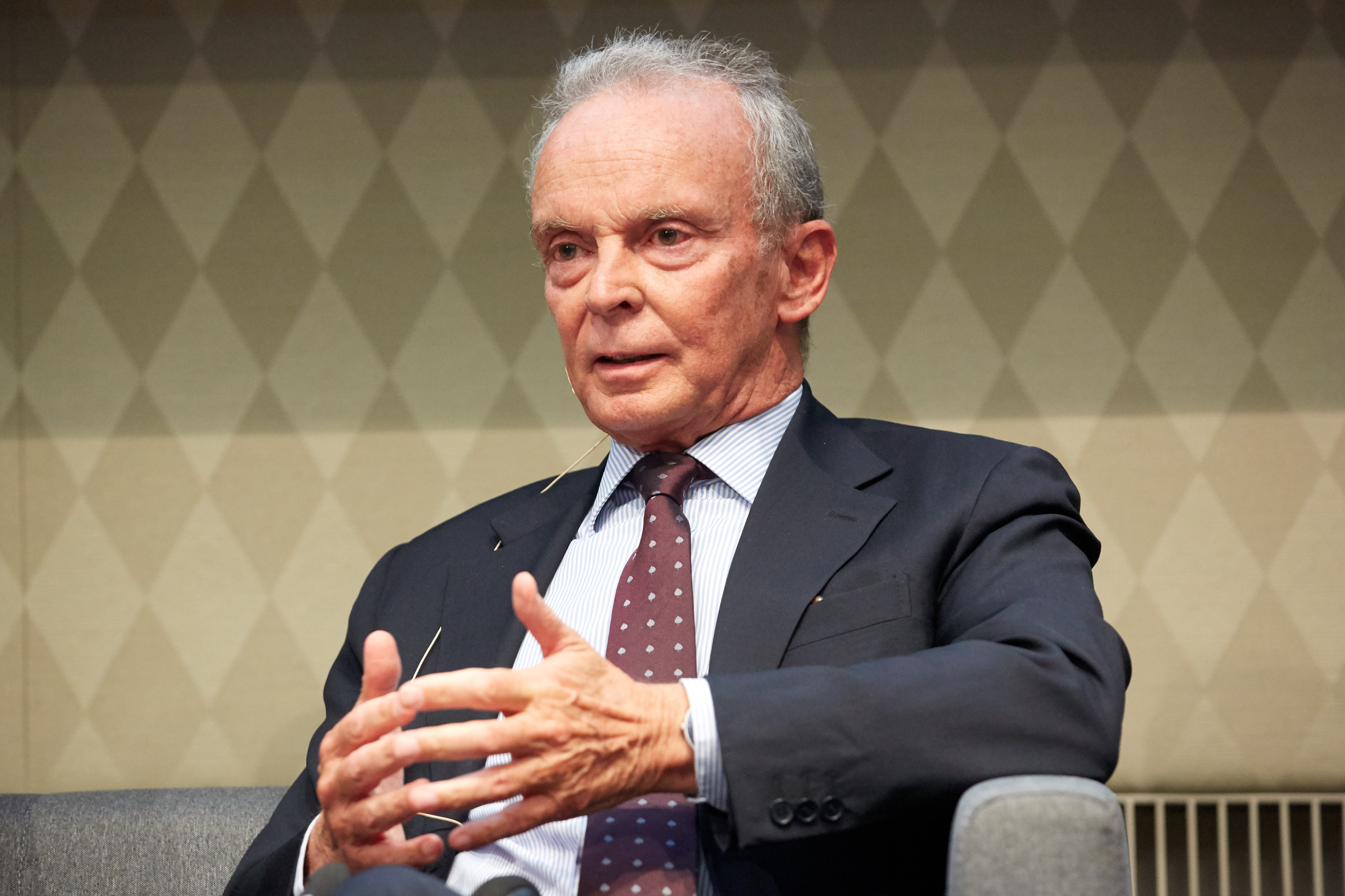 © Schneider - Wien 21.06.2018 - Das österreichische Ausseministerium (BMEIA) lud heute in der Österreichischen Nationalbank (ÖNB) zu einer hochkarätig besetzten Konferenzdiskussion mit dem Thema: `ZUKUNFT DER EUROPÄISCHEN UNION` ein. PHOTO: (vL) Axel Marschik, Politischer Direktor BMEIA, Michael Karnitschnig, Leiter des Kabinetts des EU-Kommissars Johannes Hahn, Moderatorin Cornelia Vospernik, Ferdinando Nelli Feroci, Präsident des Istituto Affari Internazionali, Wolfgang Wosolsobe, Generalsekretär am Österreichisch-Französischen Zentrum für Annäherung in Europa.